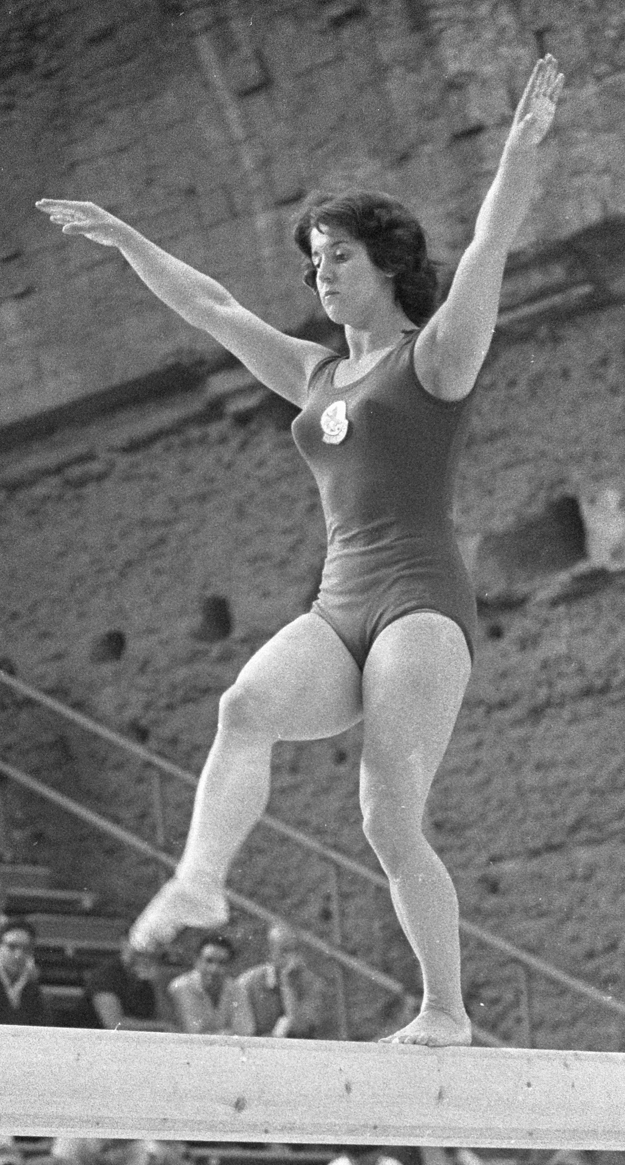 Ria Meyburg